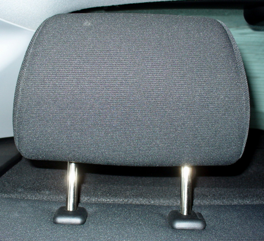 Kopfstütze Mazda3 Hinten